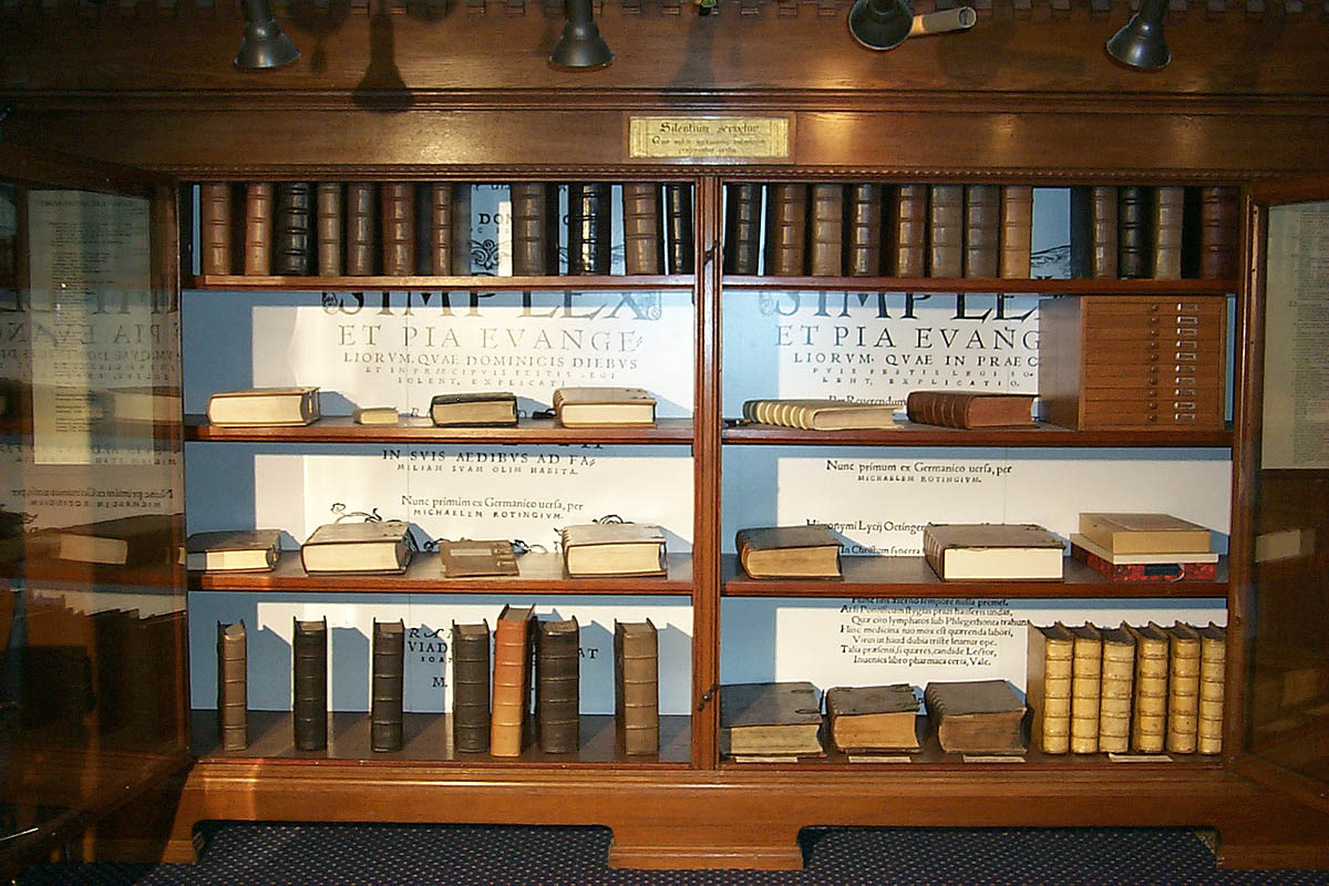 S:t Petri kyrka i Malmö. Dringenbergska liberiets boksamling.